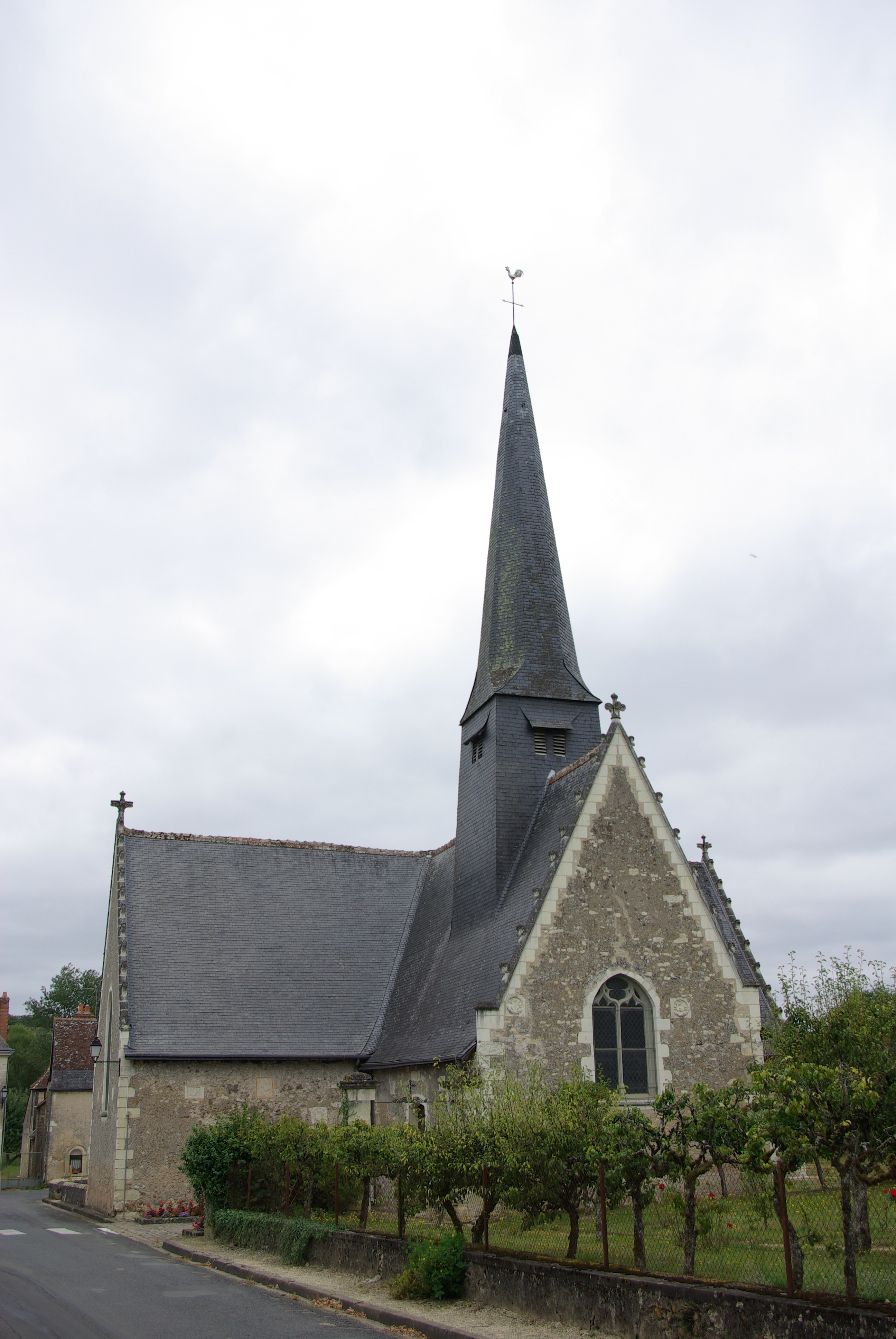 Église Saint-Étienne du Vieux Bourg (Saint-Étienne-de-Chigny).